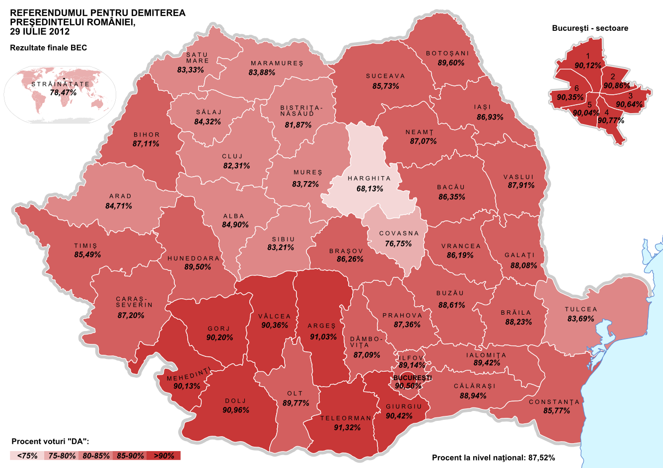 Harta procentului de voturi DA la referendumul pentru demiterea presedintelui Romaniei din 29 iulie 2012.